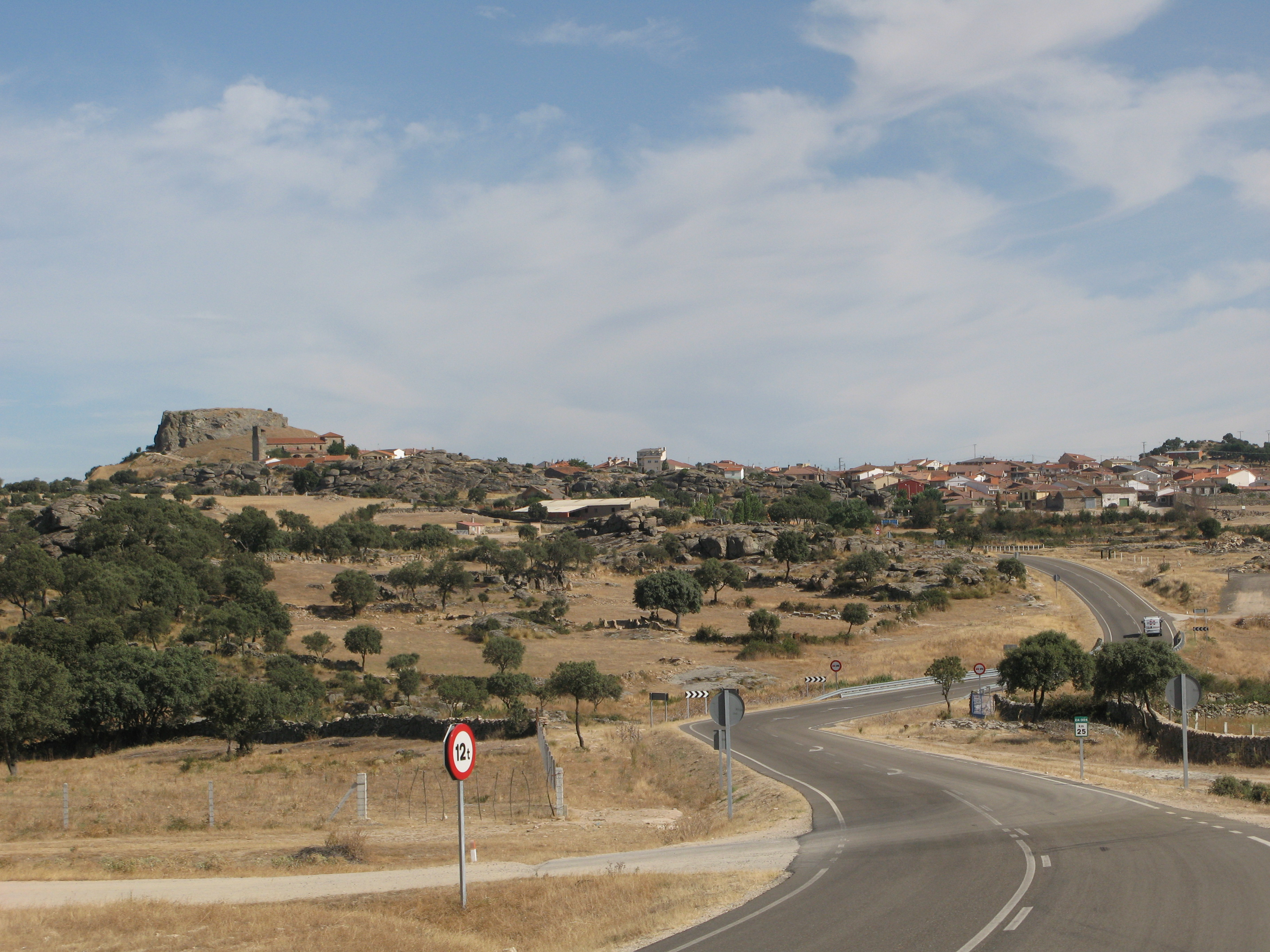 Vista general de Peñausende, municipio de la provincia de Zamora en la Comunidad Autónoma de Castilla y León, España.